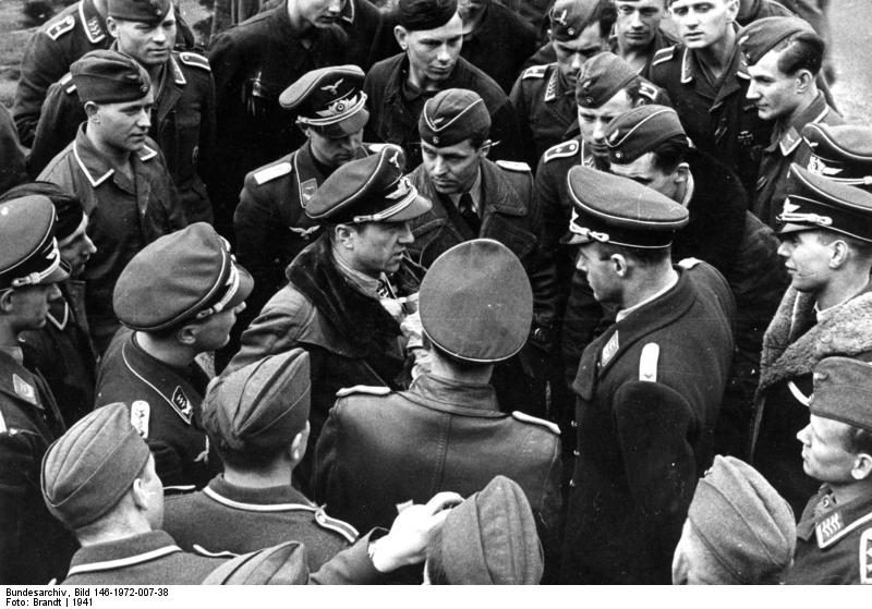 Ritterkreuzträger (jetzt Lufthansa) ObLt Jope meldet sich beim Kdr. Hptm. Fliegel nach einem Feindflug zurück. Vorn Links mit dunklen Spiegeln: Stabsarzt Kohler 1. KG 40 Bordeuax 1941 Aufn. Lt. [Eckart] Brandt